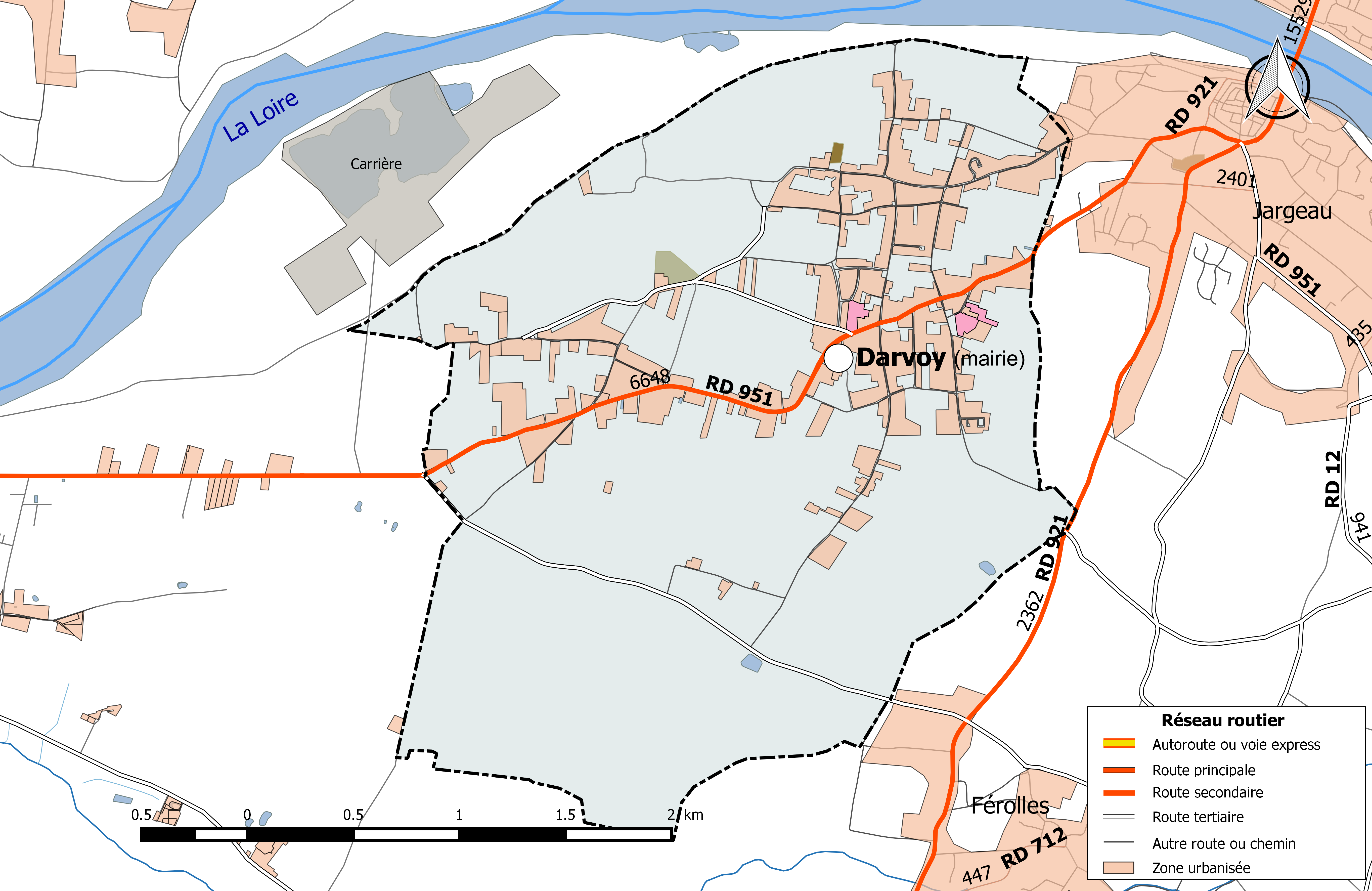 Carte du réseau routier de la commune de Darvoy.